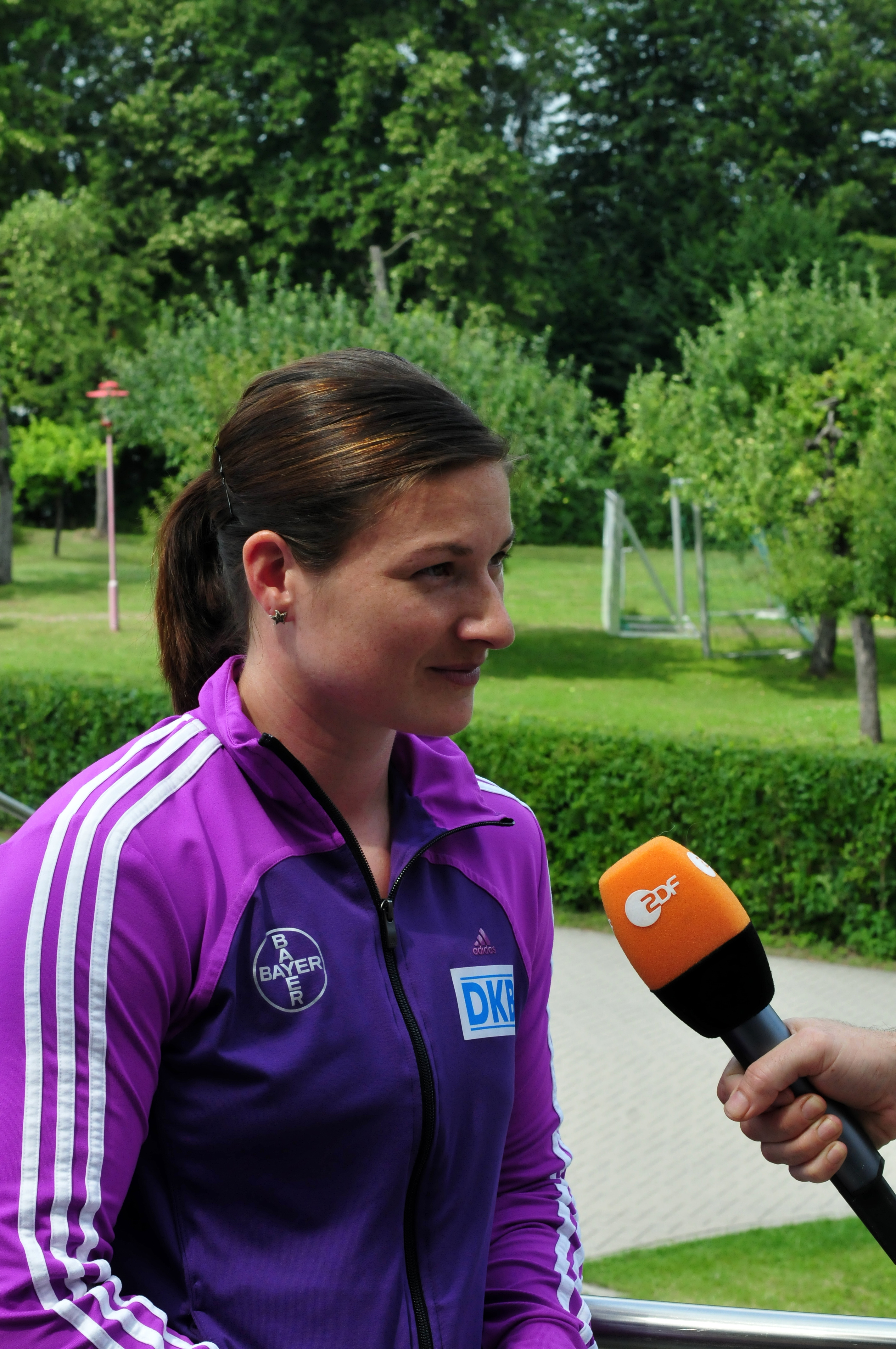 Pressetermin Olympiamannschaft in Kienbaum: Linda Stahl